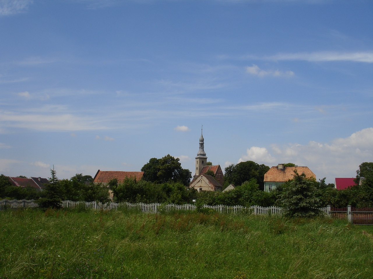 Czeska Wieś, germ. Bohmischdorf